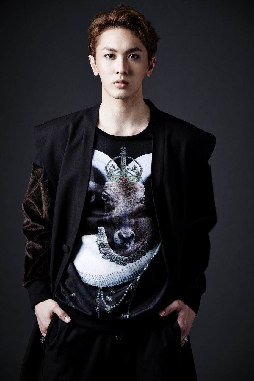 Pic Natthew by Fanclub